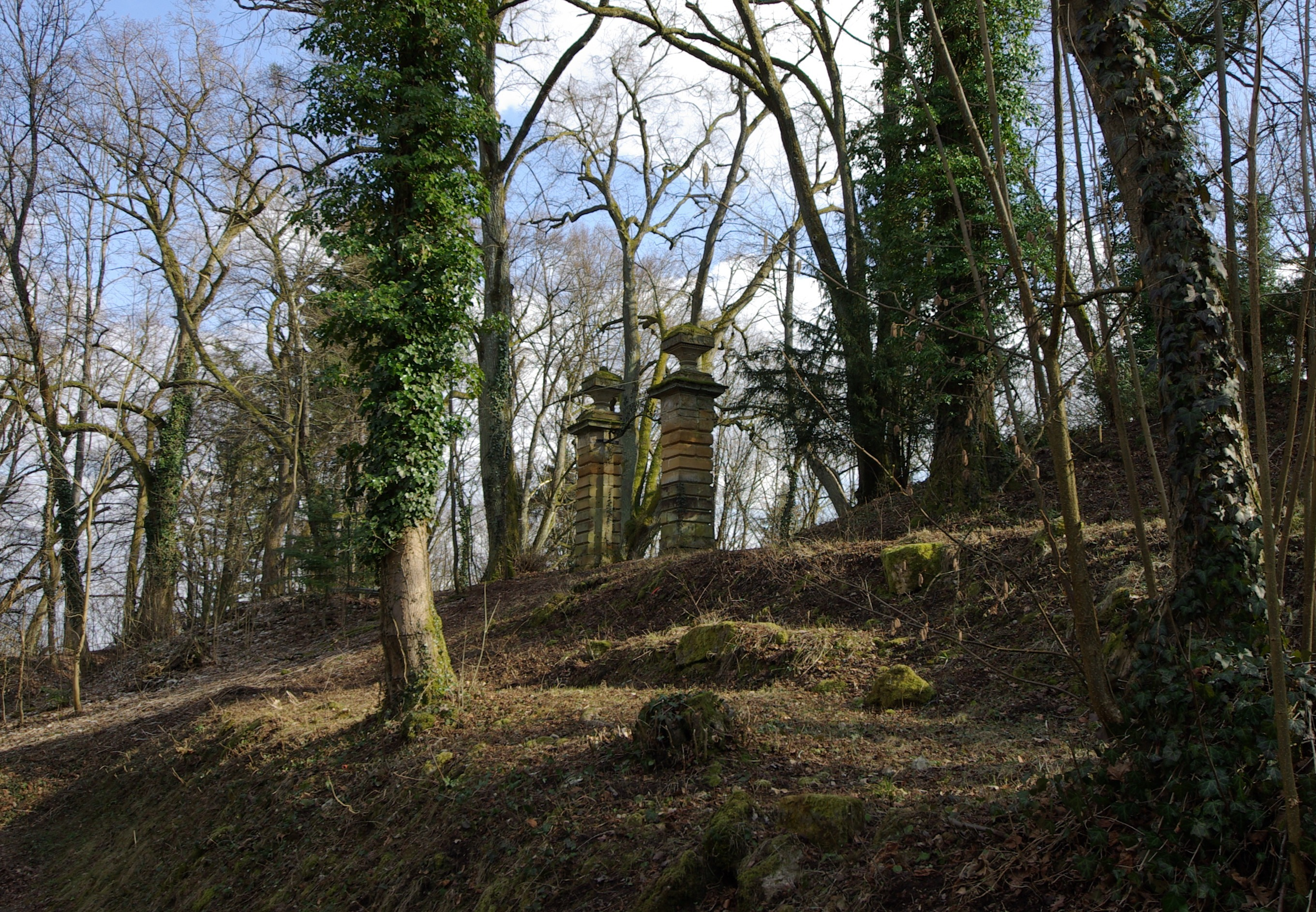 Schloss Greifenstein in der Fränkischen Schweiz, Parktor